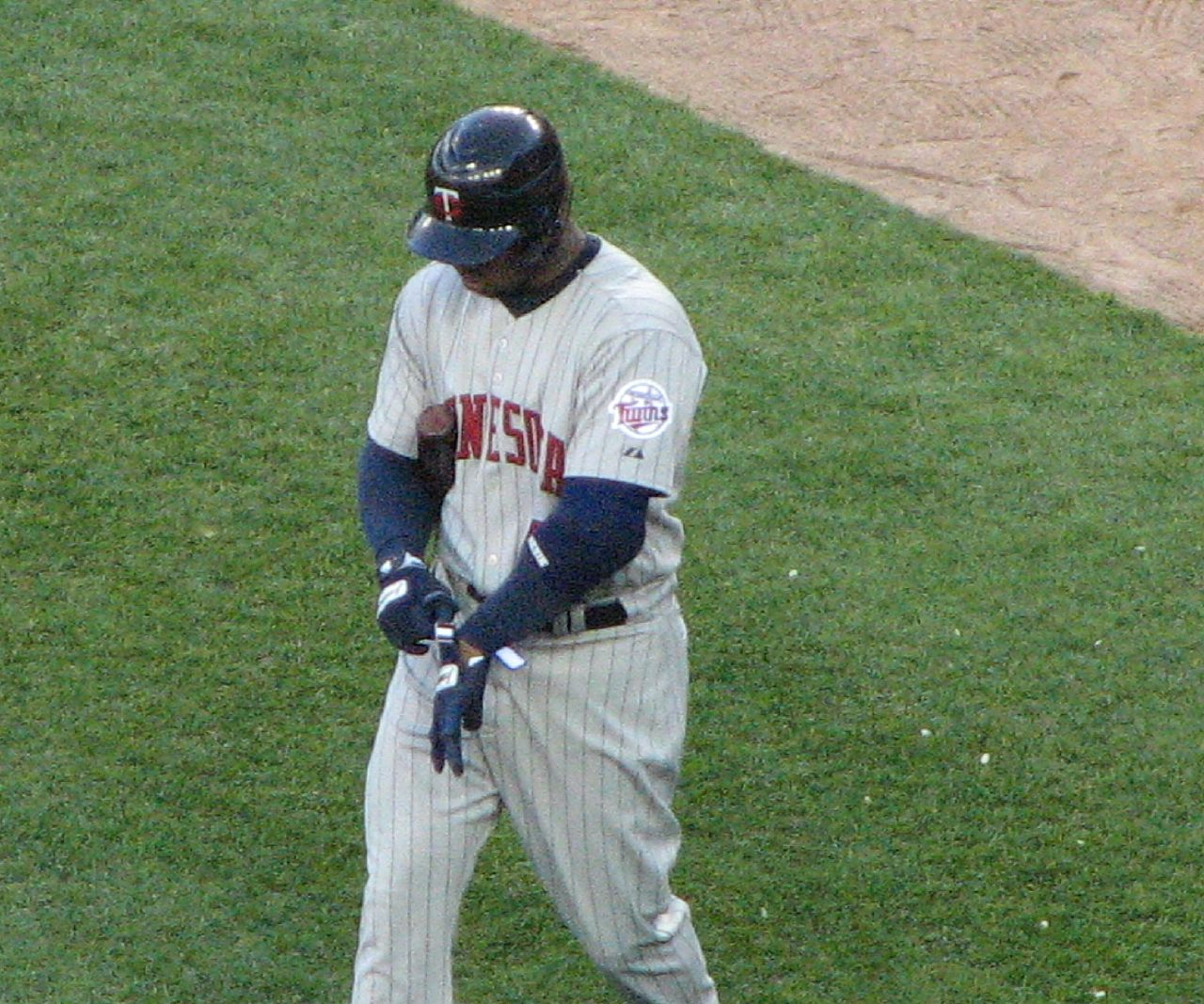 Craig Monroe